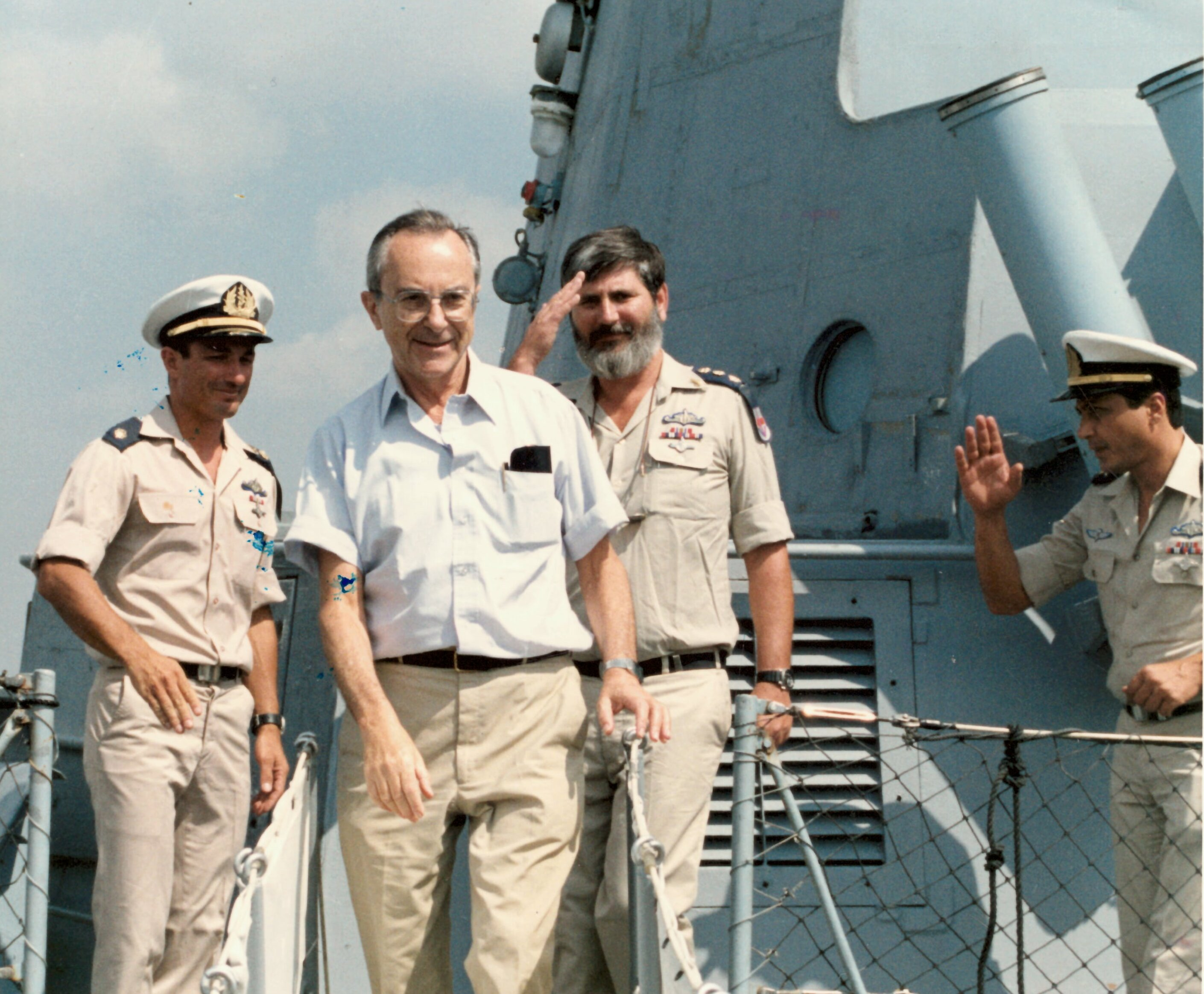 מפקד שייטת ספינות הטילים רוני אכר מלוה את שר הביטחון משה ארנס בביקור בספינה מדגם סער 4.